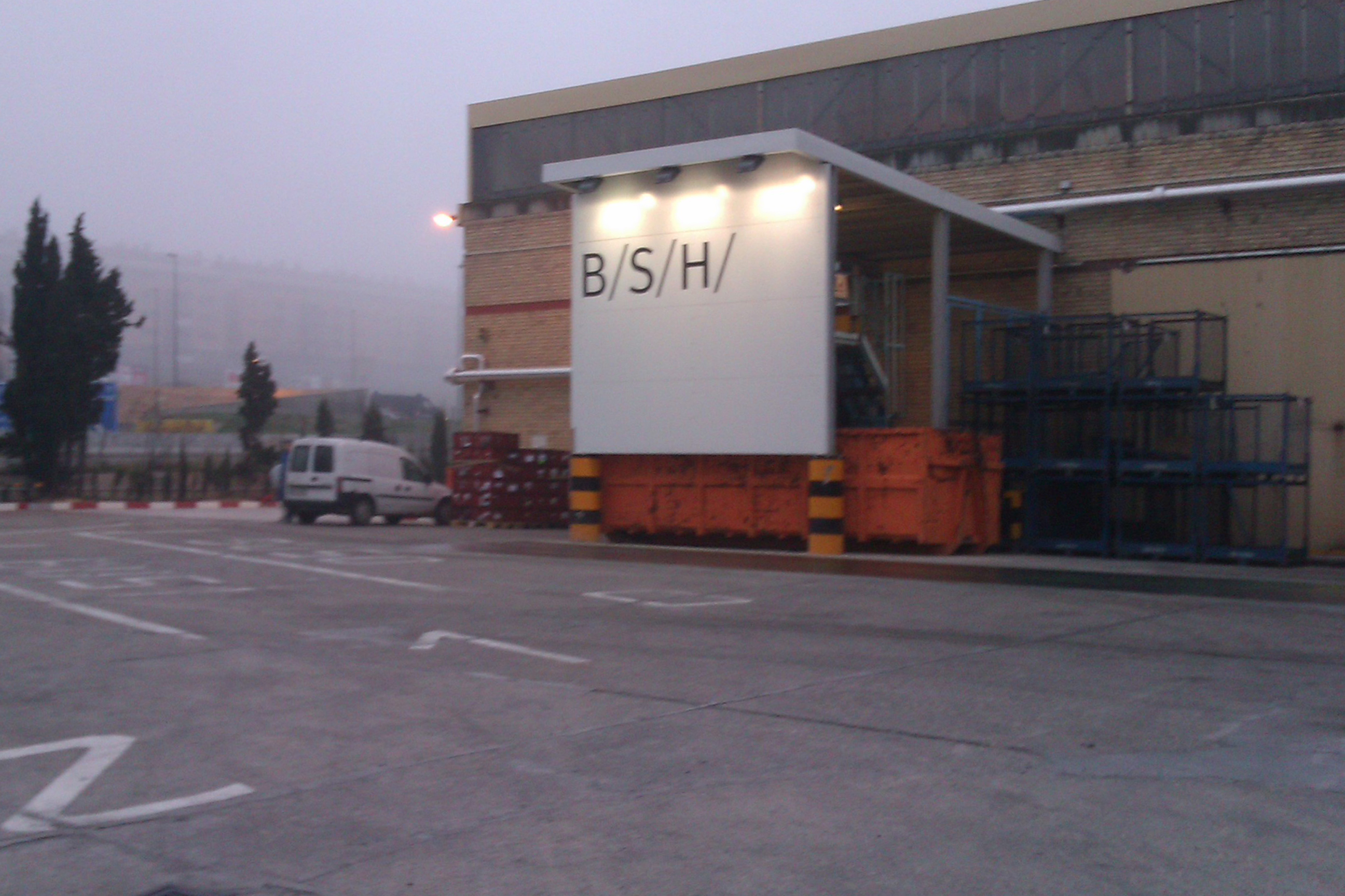 Aragonés: BSH Montañana